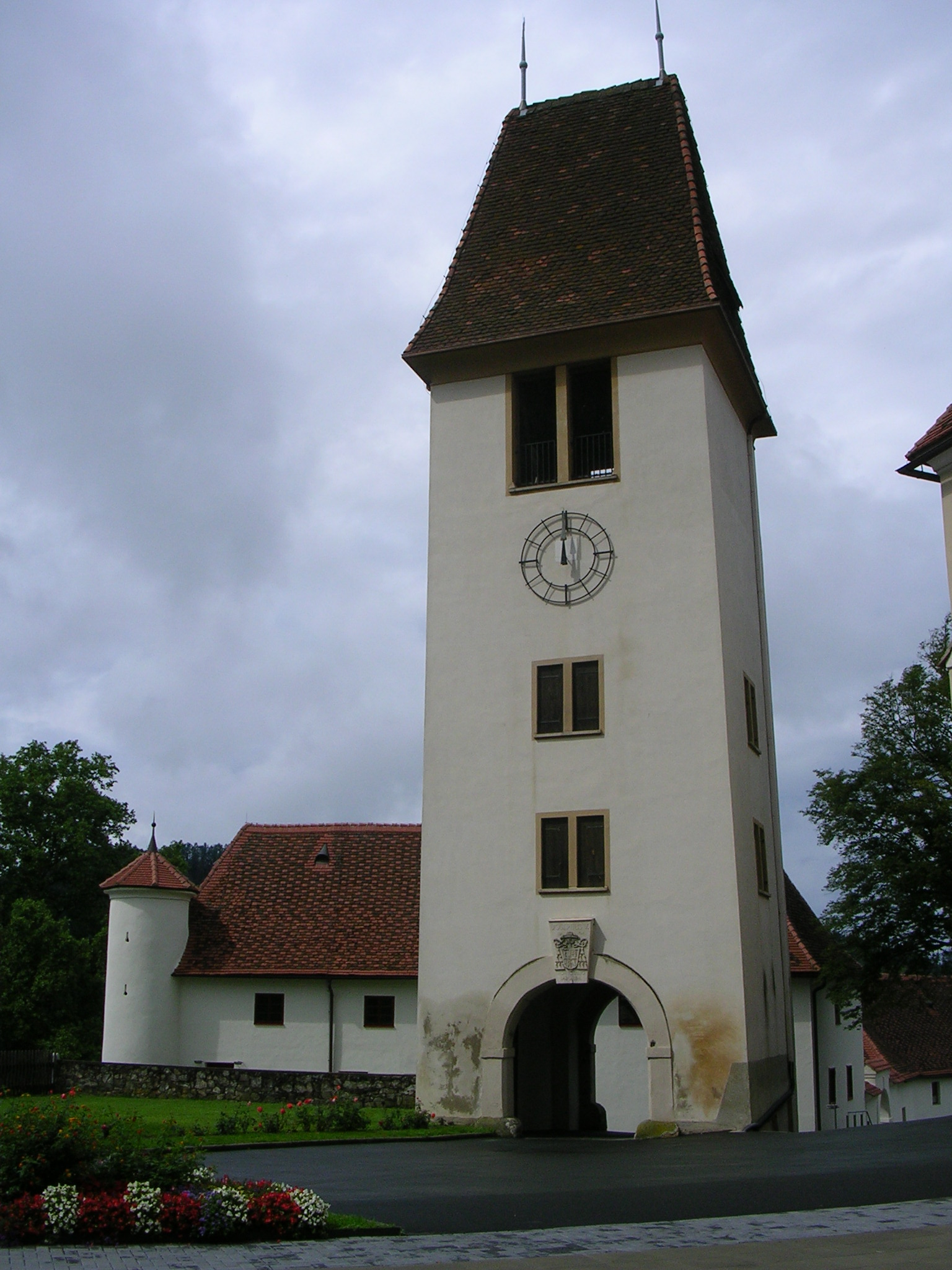 Schloss Seggau, ehemaliger Torturm, in der Gemeinde Seggauberg (Bezirk Leibnitz).